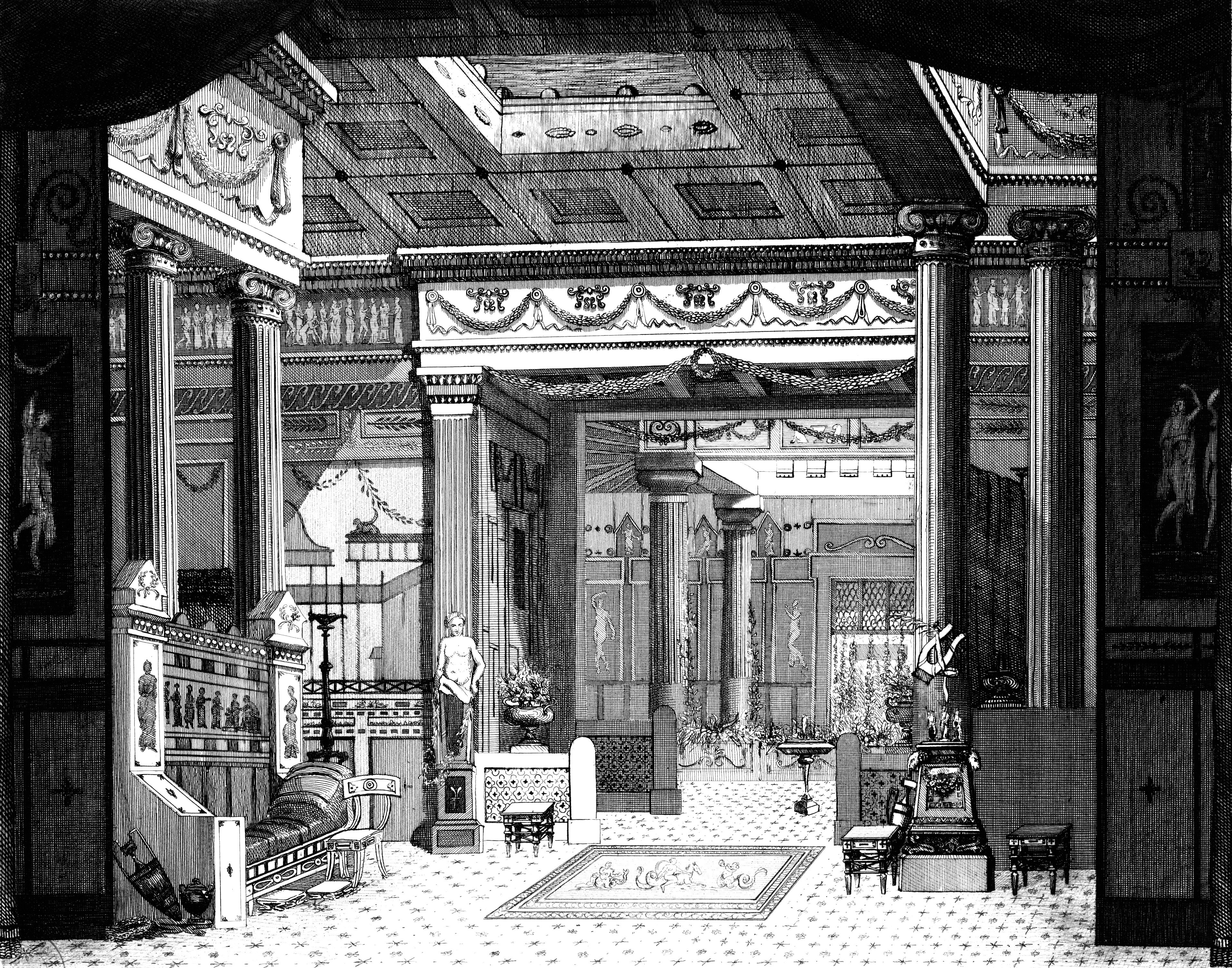 Gounod - Philémon et Baucis - Théatre-Lyrique, decoration of act 3 no 3, palais de Philémon et Baucis, 1861 [estampe] / L. Jaugey ; d'après MM. Cambon et Thiéry Auteur : Jaugey, L. (18..-18.. ; dessinateur). Dessinateur du modèle. Graveur Auteur : Cambon, Charles-Antoine (1802-1875). Peintre du modèle Auteur : Thierry, Joseph (1812-1866). Peintre du modèle